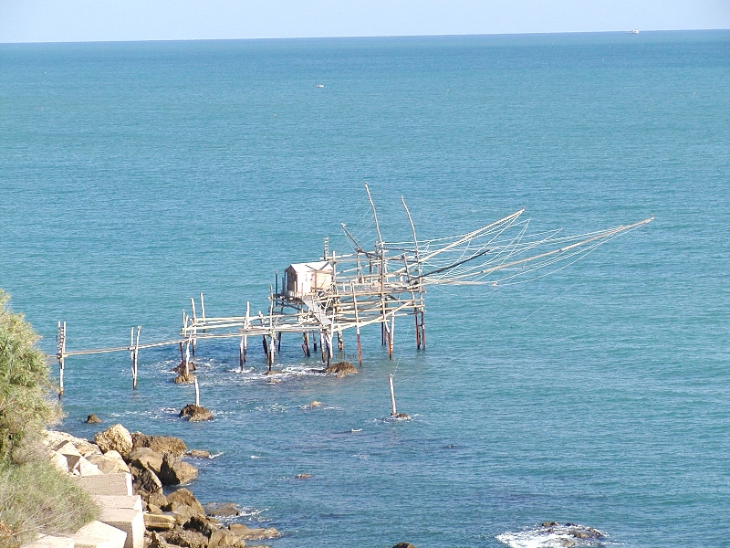 Ein Trabocci bei Ortona (San Vito)